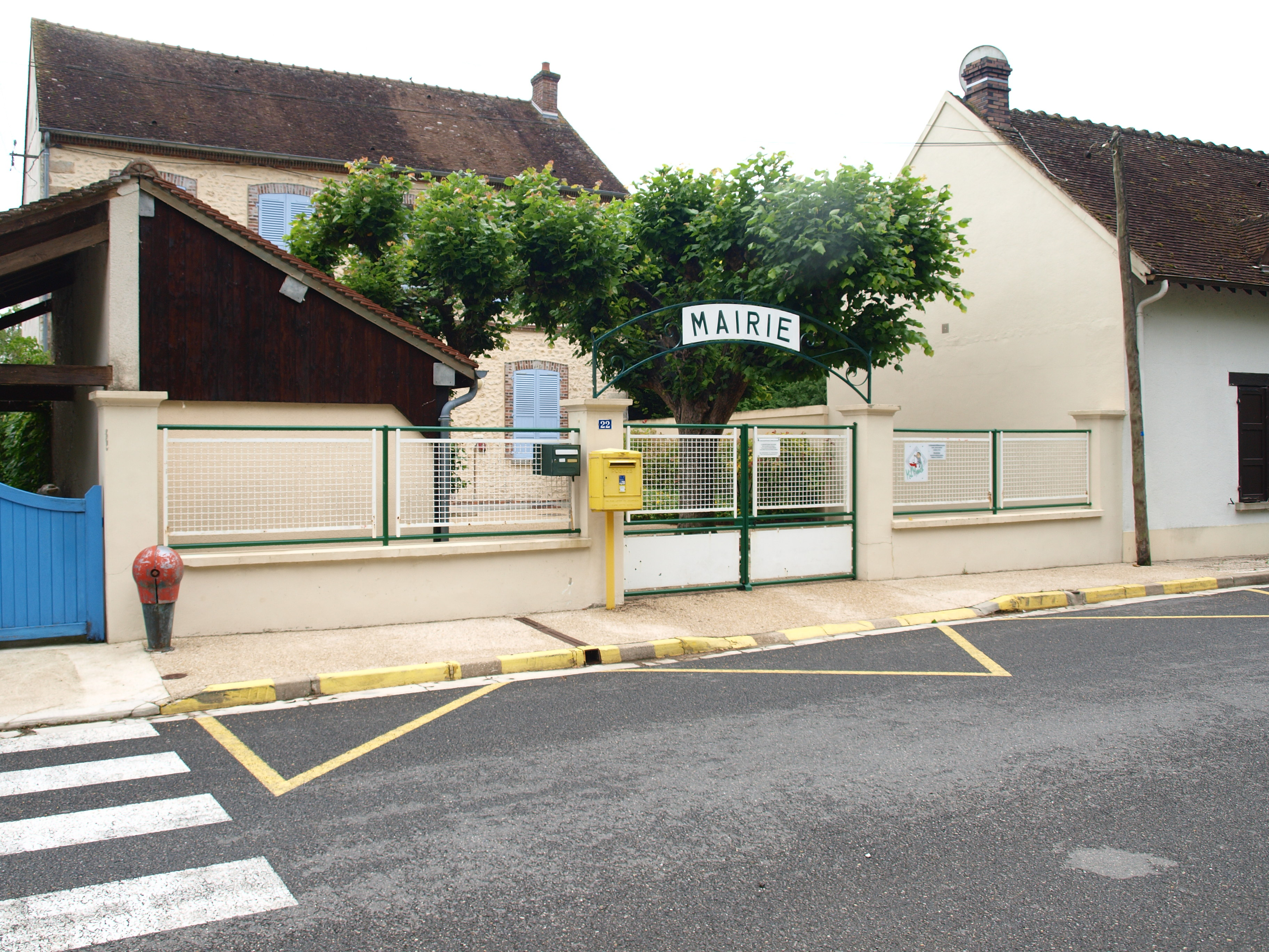 Mairie de Grisy-sur-Seine (Seine-et-Marne, France) . La photographie diffère de l'état actuel de la façade en l'absence des deux drapeau français et européen rajoutés, de même qu'une pancarte pour une « halte-garderie ».